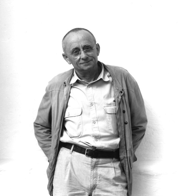 Portrait Heinz Bienefeld